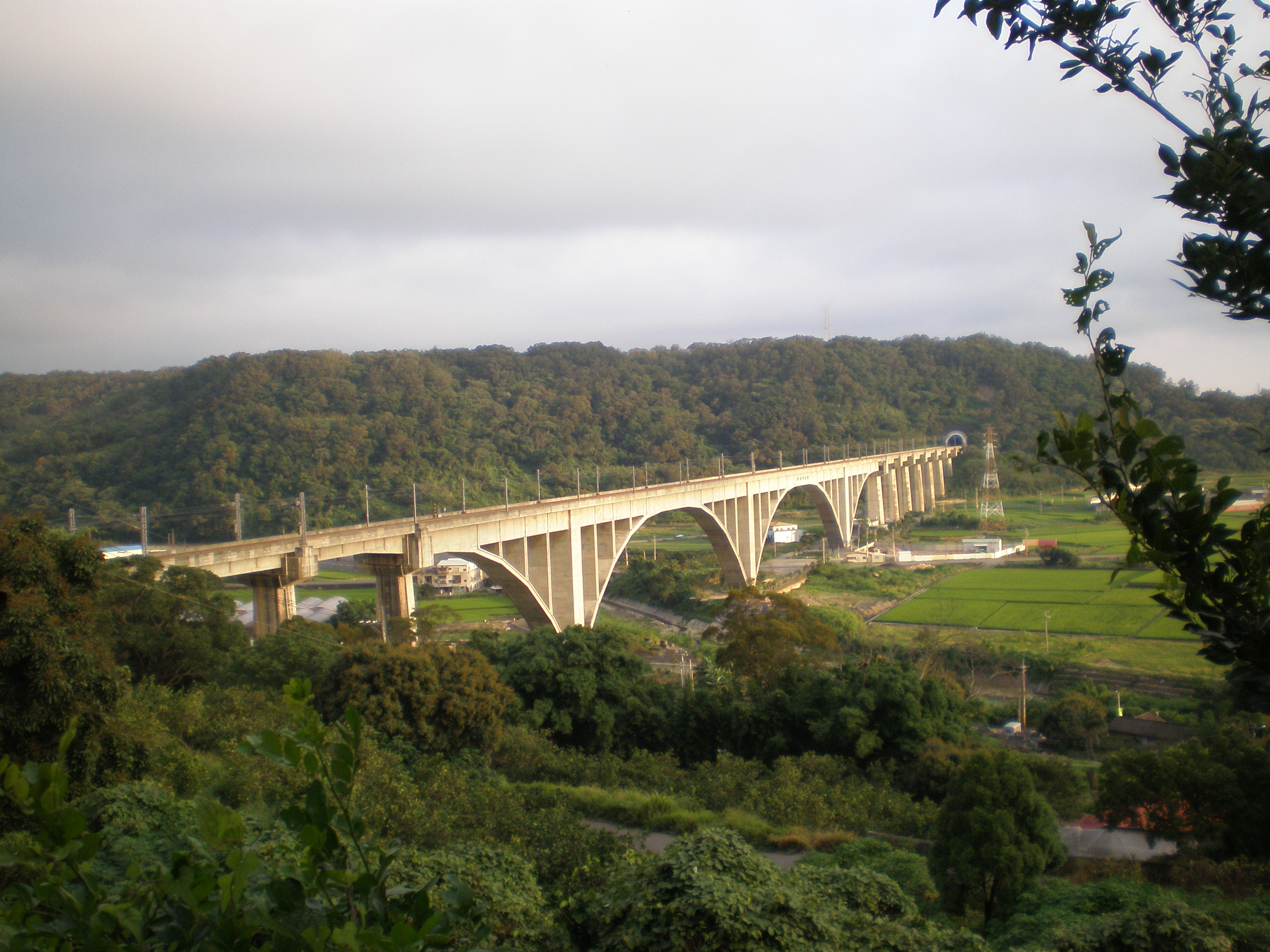 遠眺台鐵山線鯉魚潭拱橋。